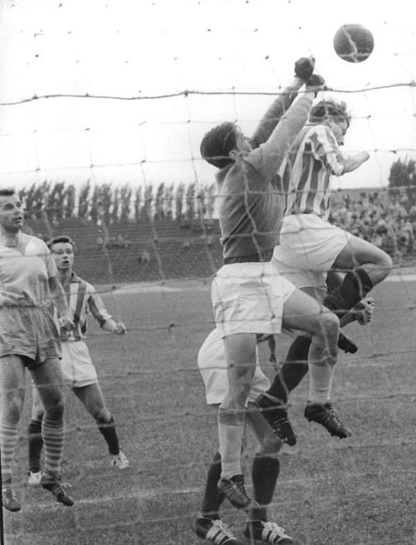 Zentralbild-Wendorf Wen-Qu 26.8.1959 In der Zwischenrunde des FDGB-Pokals standen sich am 26.8.1959 im Berliner Jahn-Sportpark die Fußballmannschaften vom ASK-Vorwärts Berlin und der SC Wismut Karl-Marx-Stadt gegenüber. Wismut siegte mit 4:2 (1:2) Toren. UBz. Wismutspieler Tröger im Kampf mit Vorwärts-Torhüter Spickenagel.